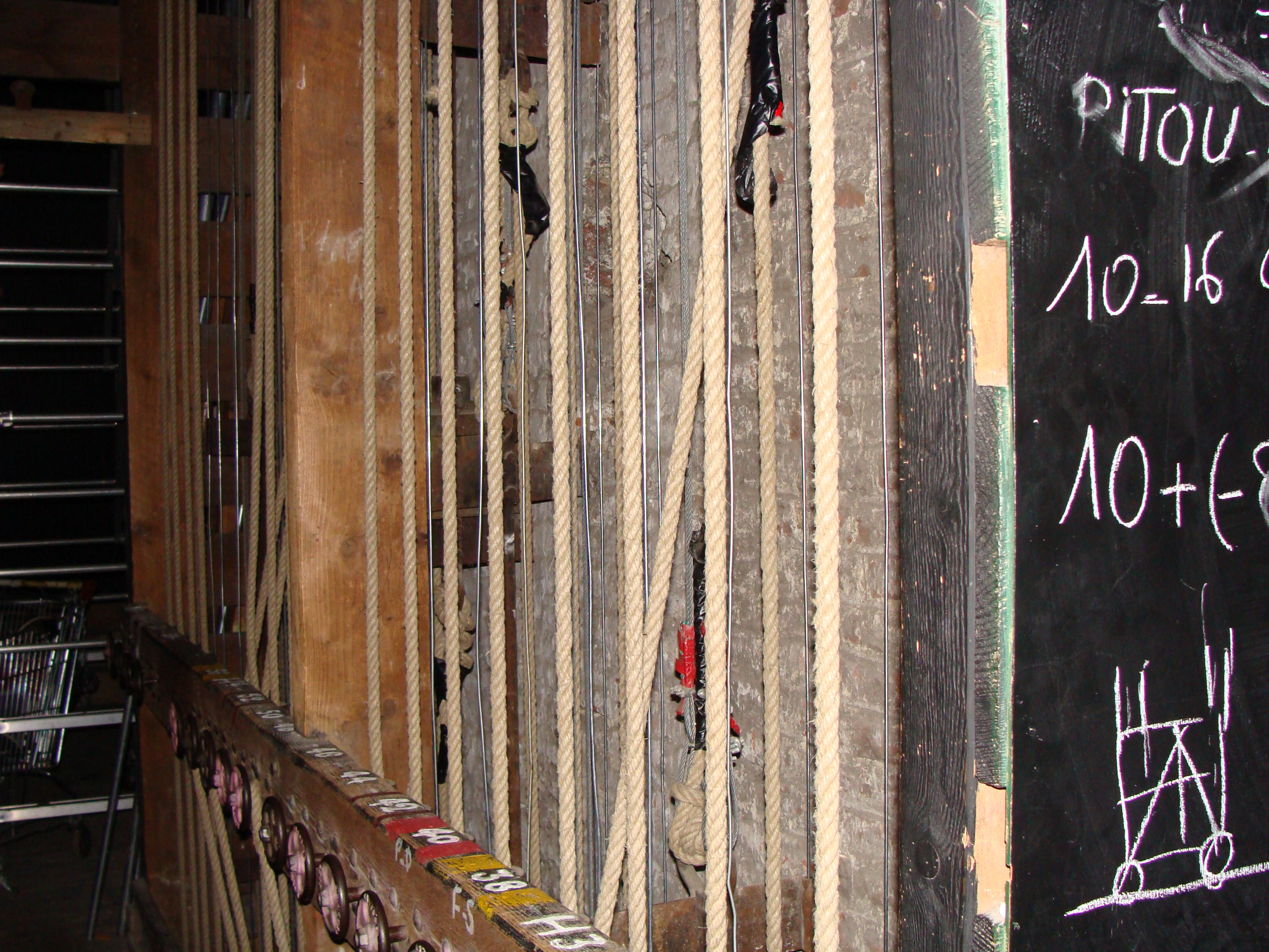 Théâtre de Douai - Détail de la machinerie de scéne par fils